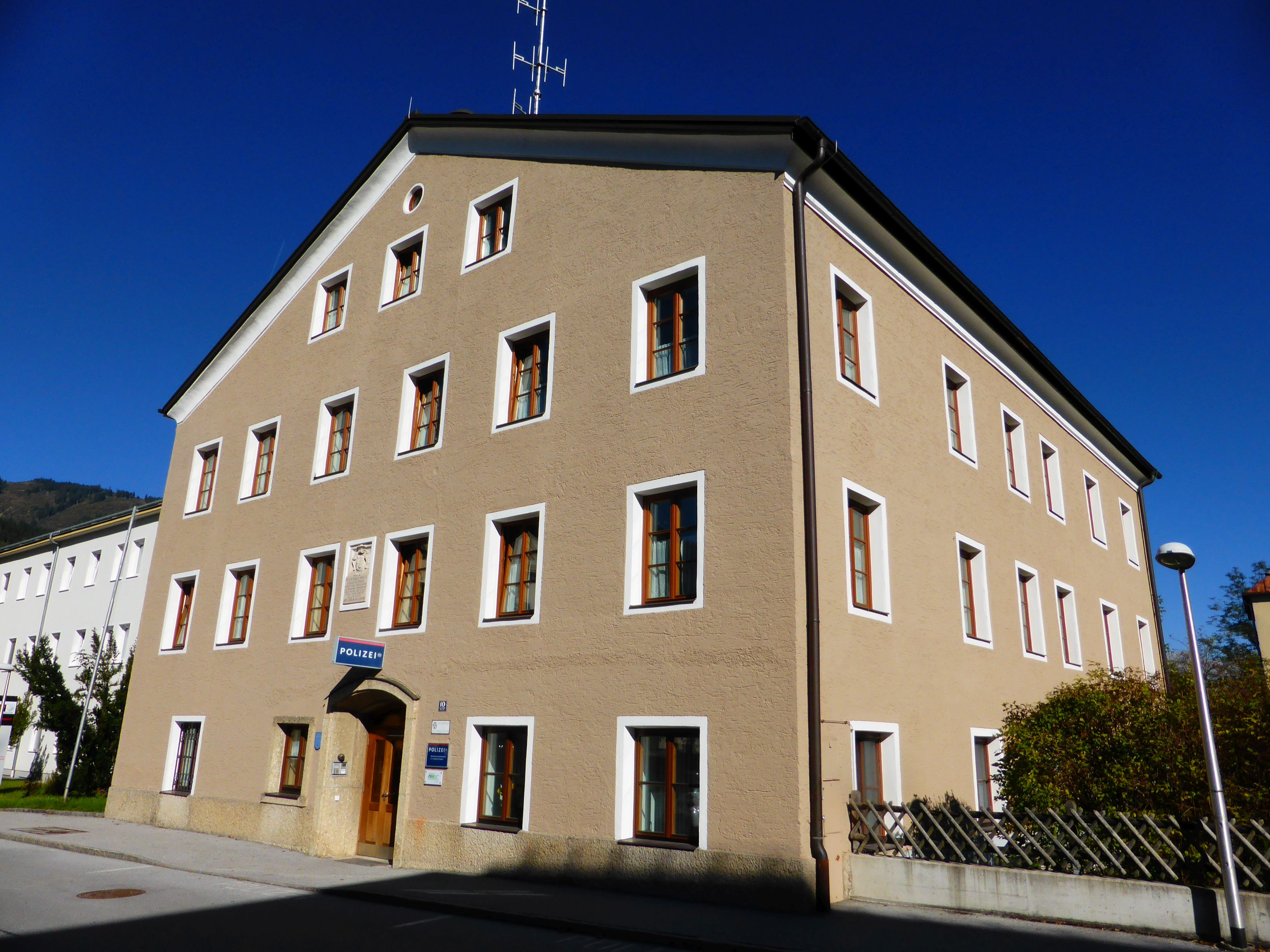 Inschrifttafel